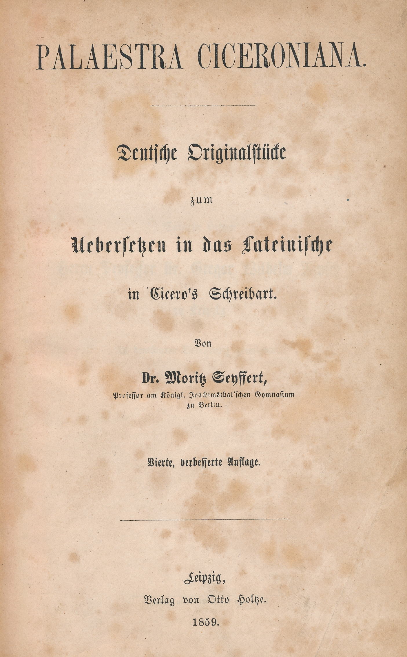 Dr. Moritz Seyffert: Palestra Ciceroniana, Leipzig 1859